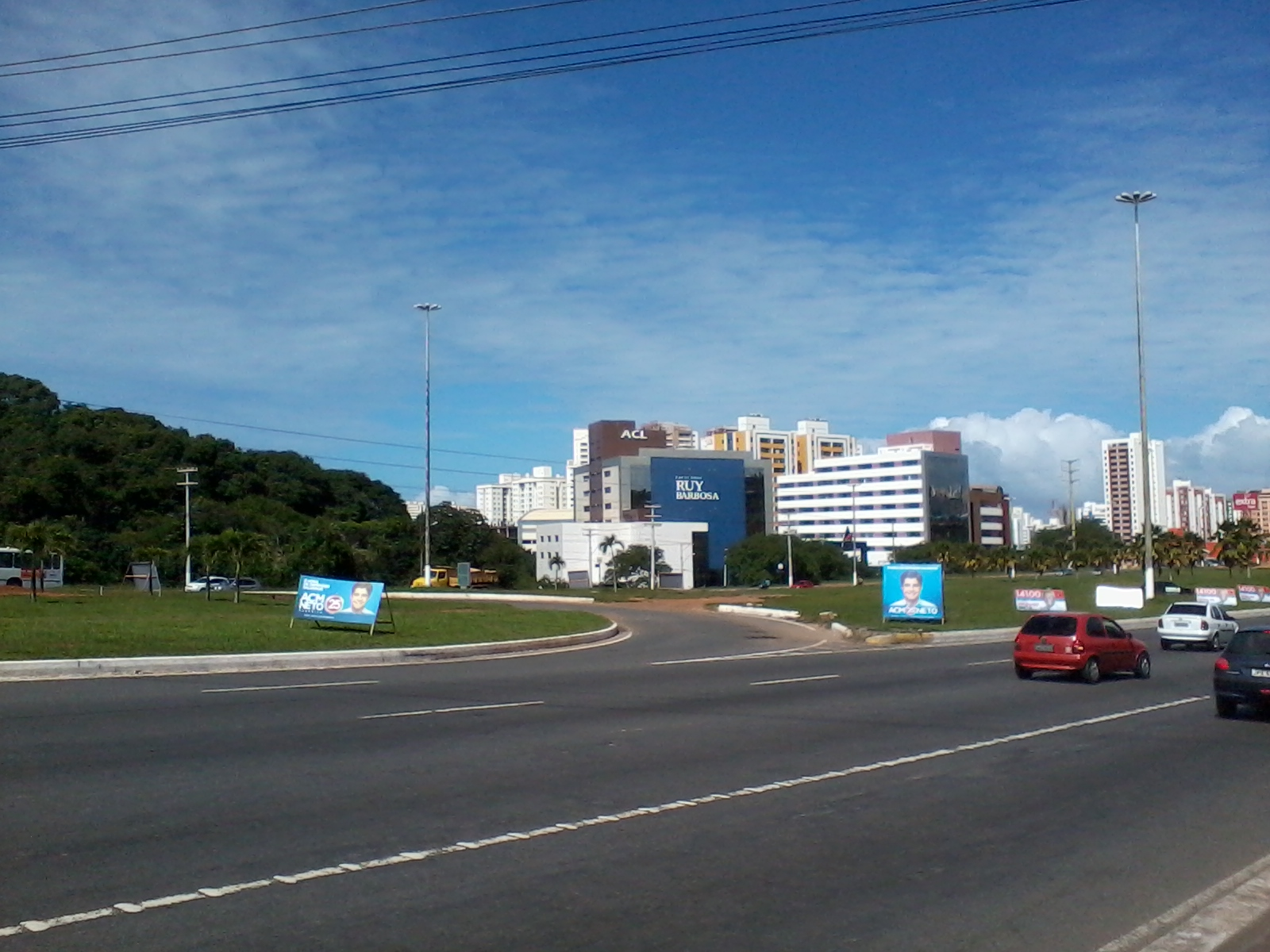 Propagandas eleitorais de ACM Neto para as Eleições municipais de Salvador de 2012 no canteiro central da Avenida Paralela e a Faculdade Ruy Barbosa (e ÁREA1) ao fundo, Salvador, Bahia, Brasil.